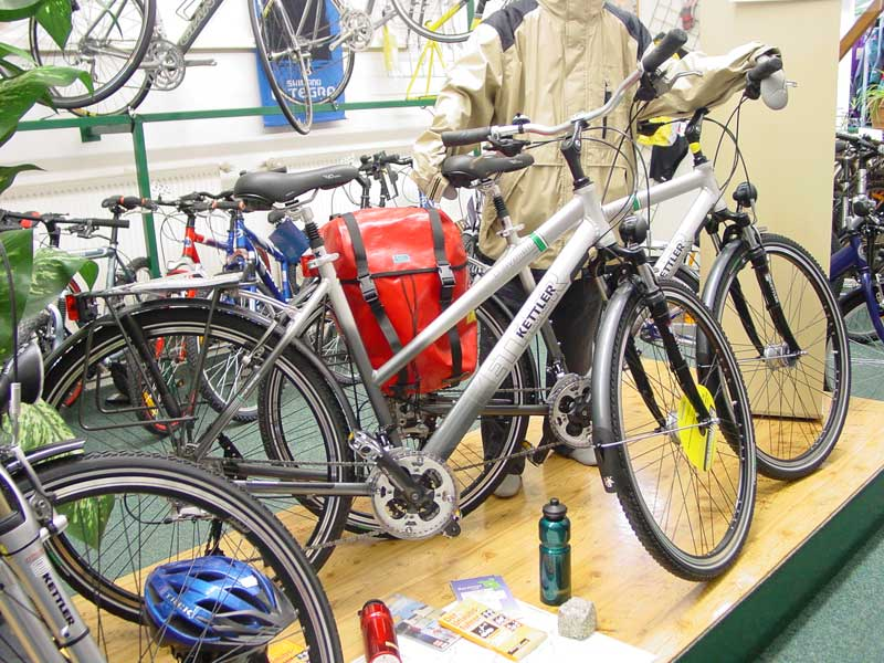 Treckingrad